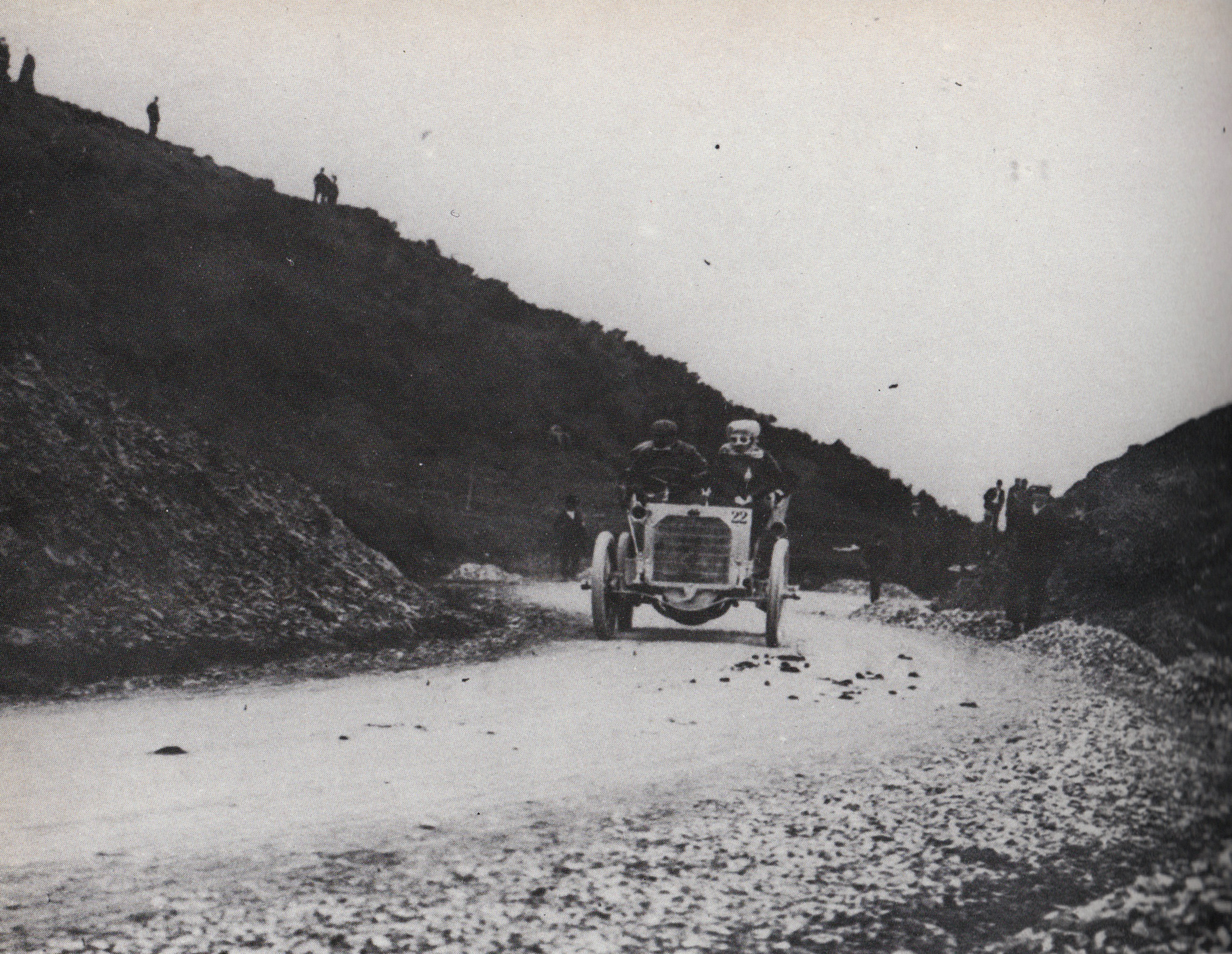 Coppa della consuma 1903. Alfredo Cappellini e consorte su Fiat, vincitori della categoria Turisti